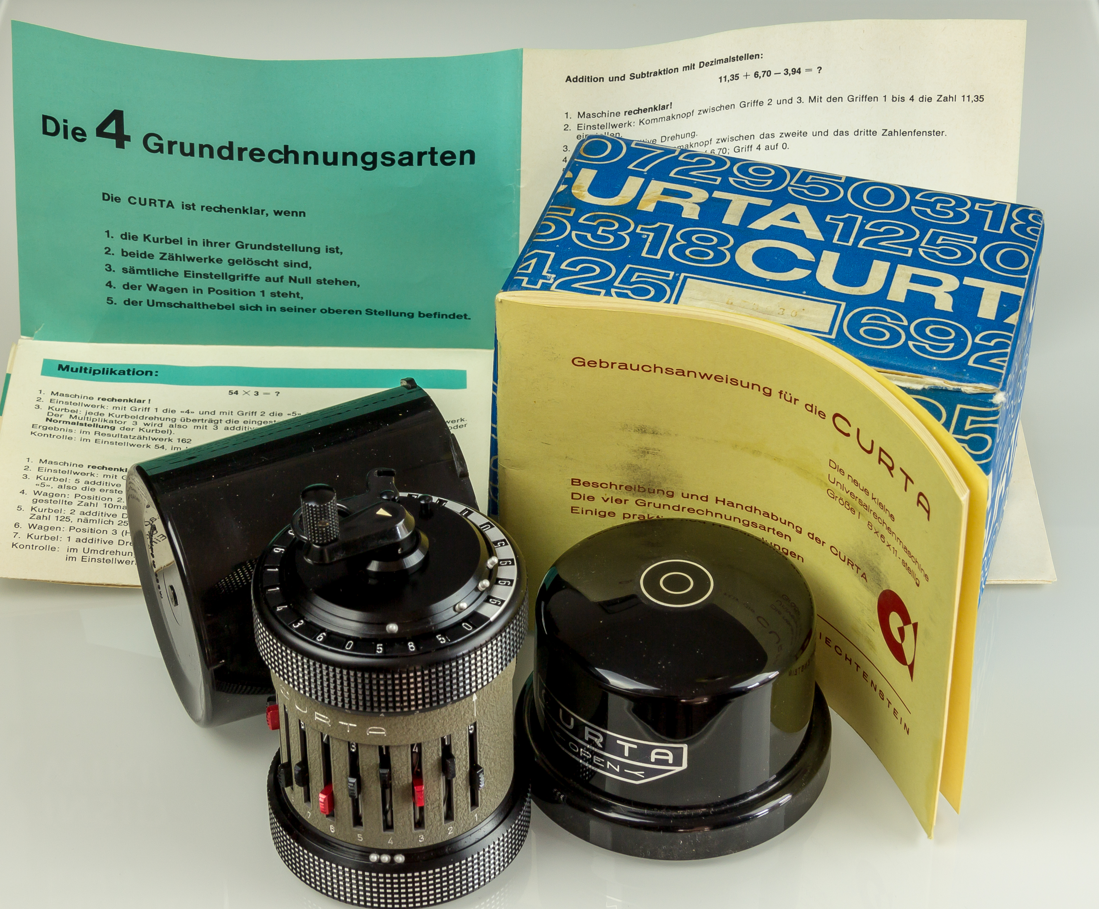 Curta II